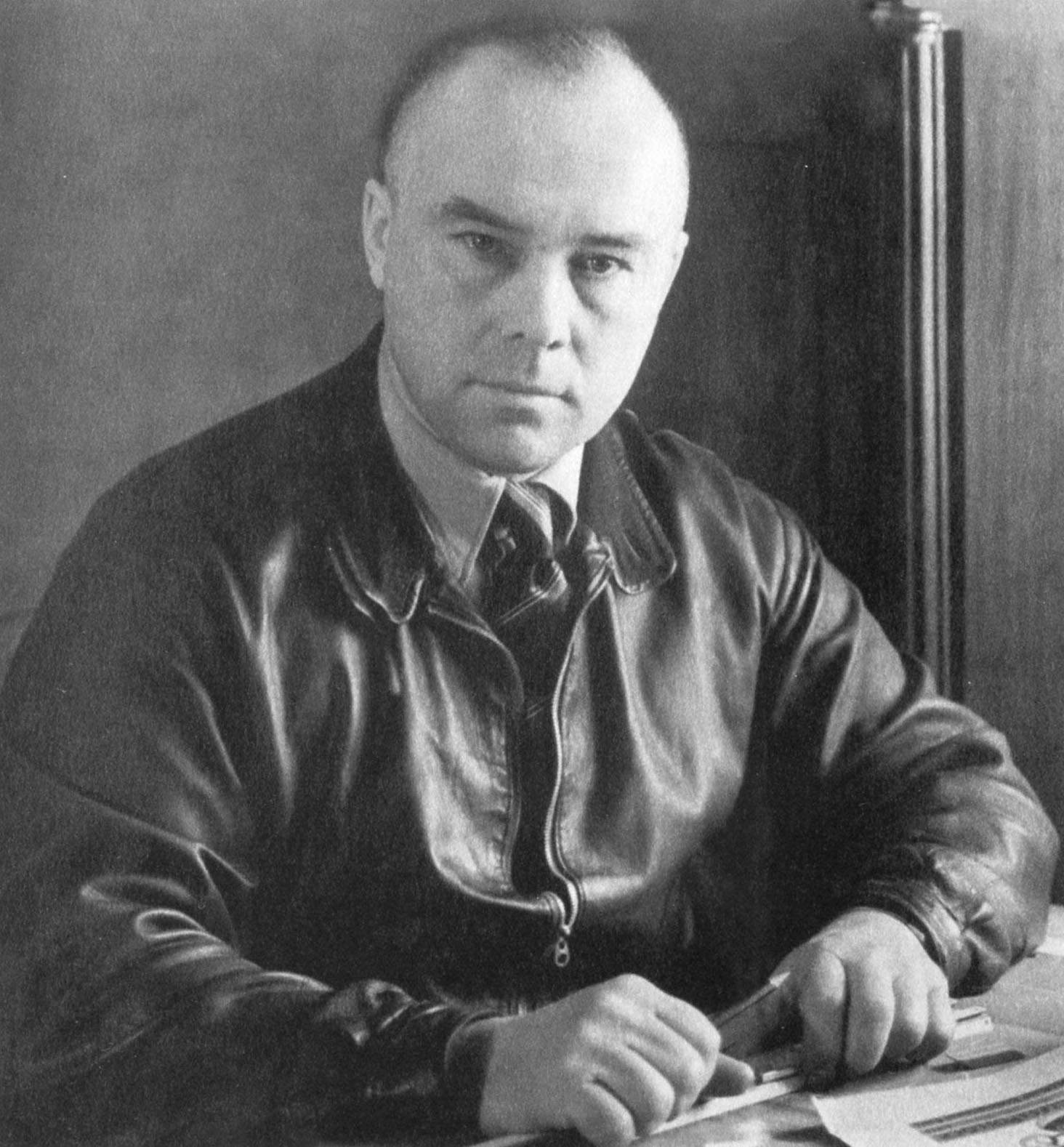 Николай Николаевич Поликарпов (1892—1944) — советский авиаконструктор